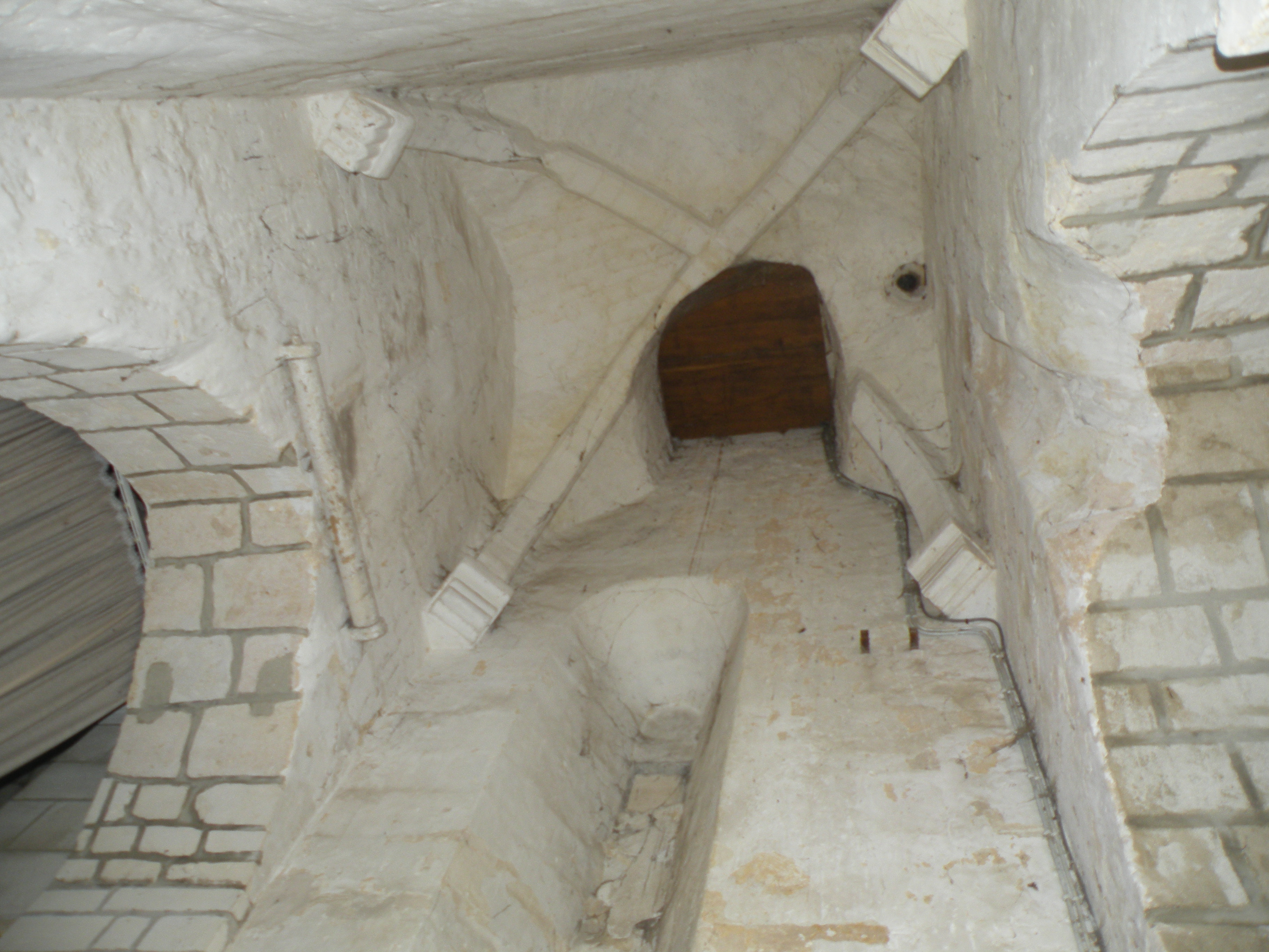 Intérieur de l'église Saint-Martin de Frouville